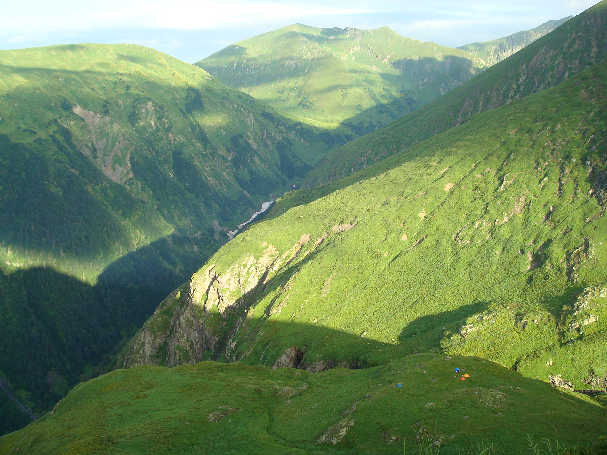 Долина реки Пслух. Кавказский государственный природный биосферный заповедник. This image is related to the protected area of Russia number 2300002